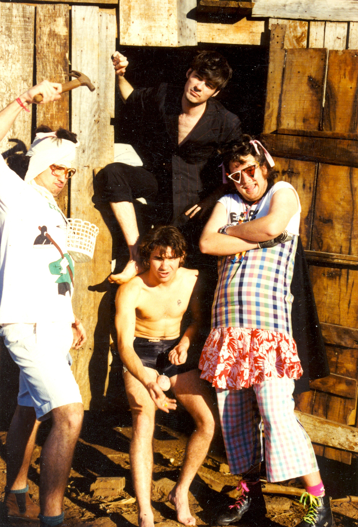 Campo e Lavorá